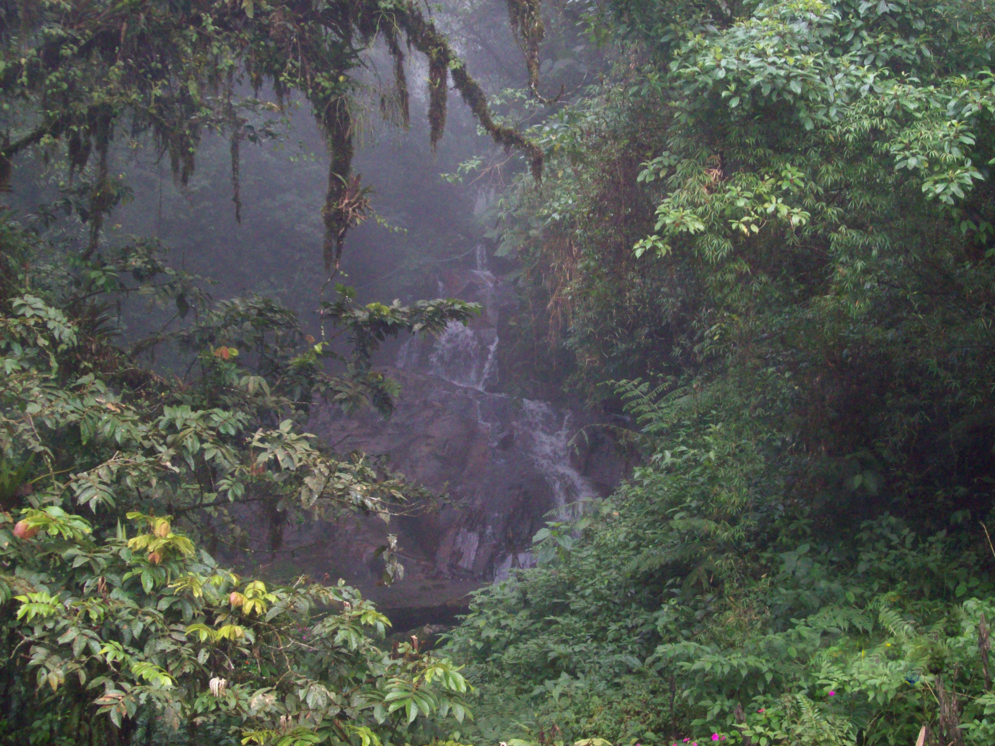 Floresta Atlântica - Serra da Graciosa - Caminho do Itupava